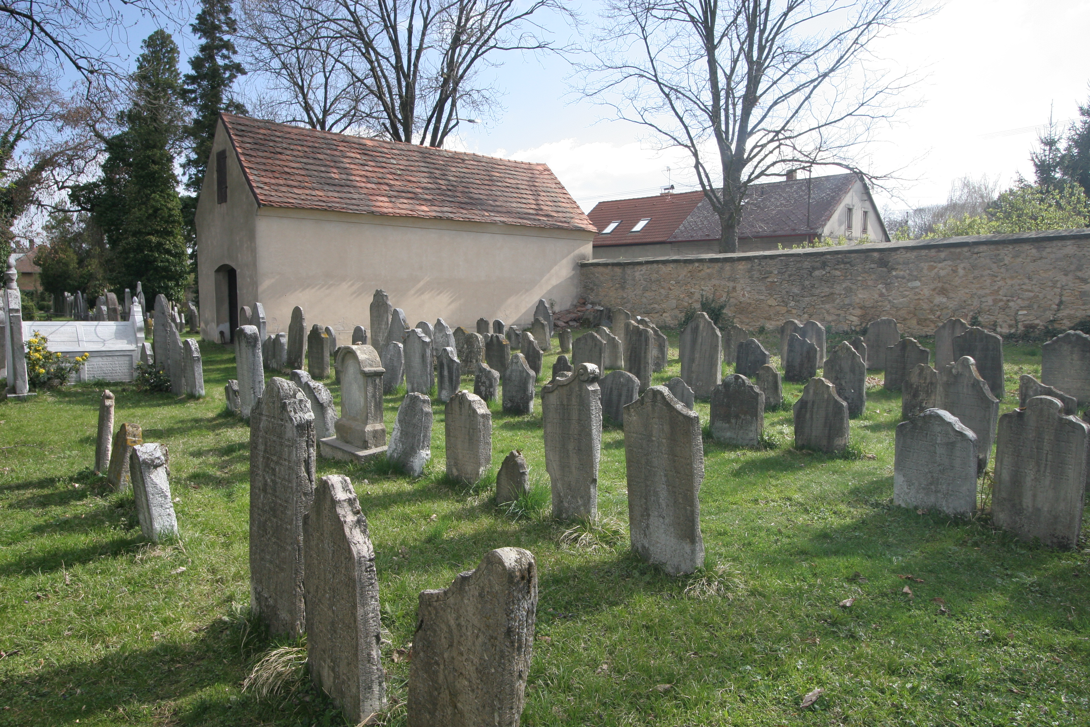 Židovský hřbitov (Heřmanův Městec), Havlíčkova 668, Heřmanův Městec, Heřmanův Městec.